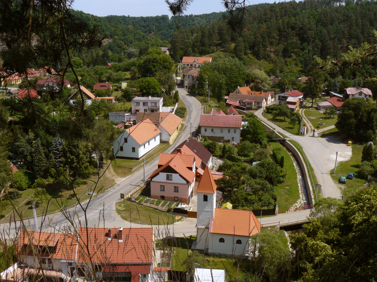 Podhradí nad Dyjí from Frejštejn